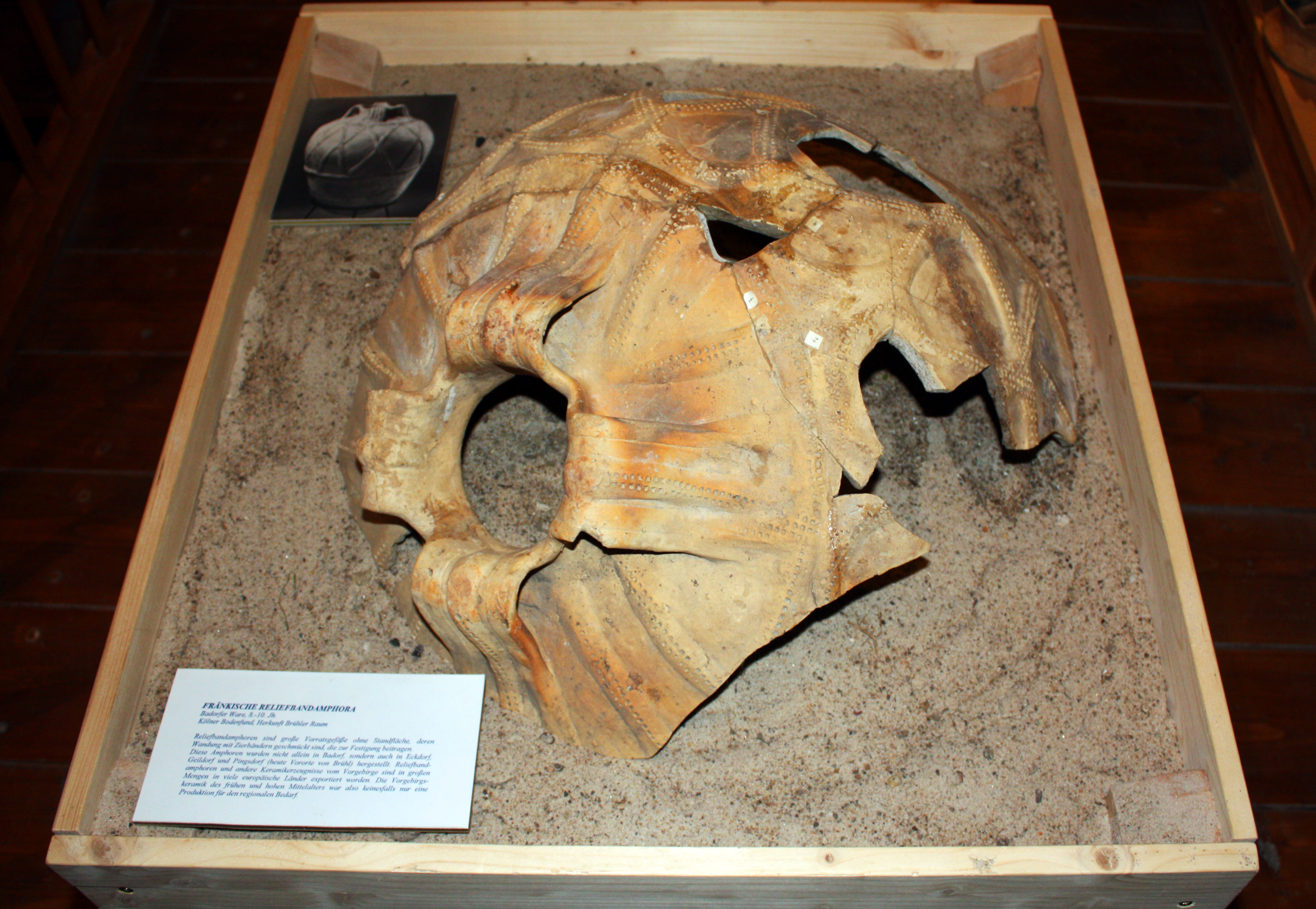 Brühler Keramikmuseum. Fränkische Reliefbandamphore Badorfer Ware, 8. – 10. Jahrhundert. Kölner Bodenfund, (ein Fund solcher Art wurde nach dem Zweiten Weltkrieg bei Grabungen am Krieler Dom dokumentiert) Herkunft Brühler Raum